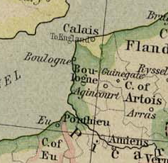 Bonen 1477